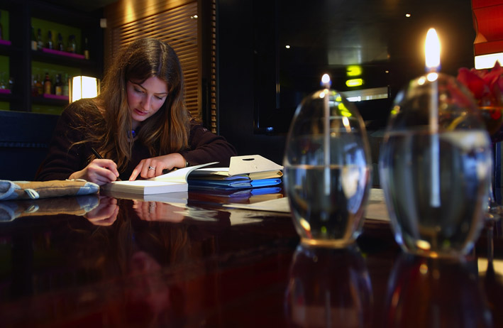 L'écrivain française Ingrid Astier en 2005.